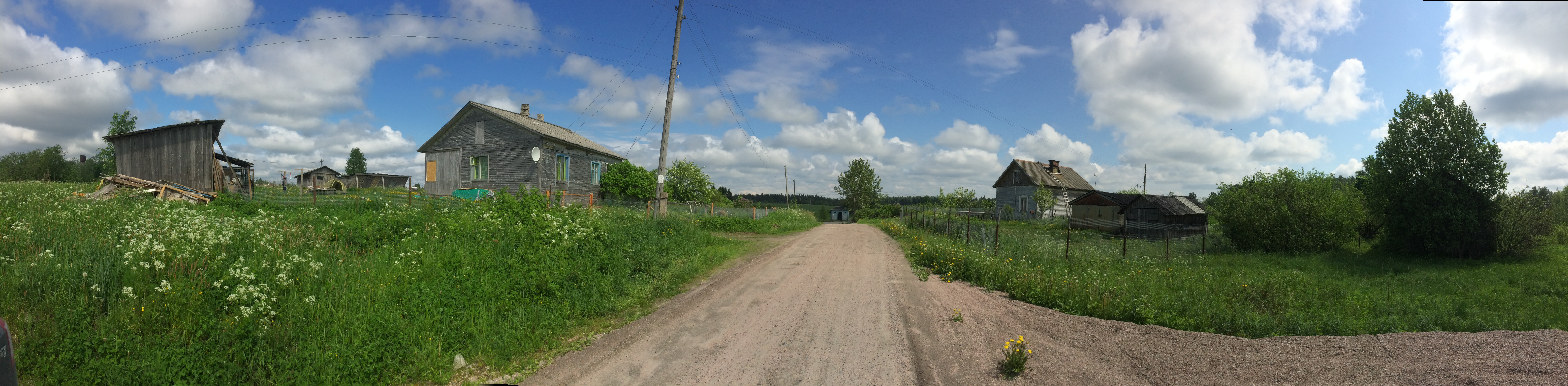 Метсякюля